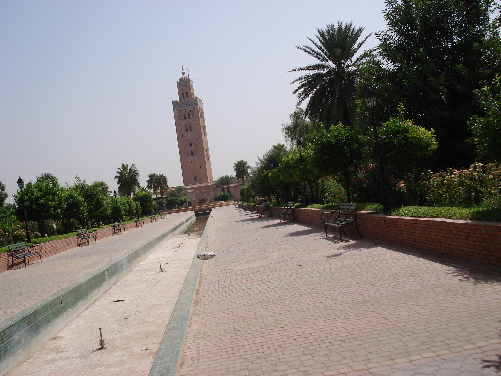 Koutoubia mosque